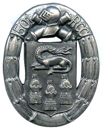 Insigne du 501e régiment de chars de combat - Type 1